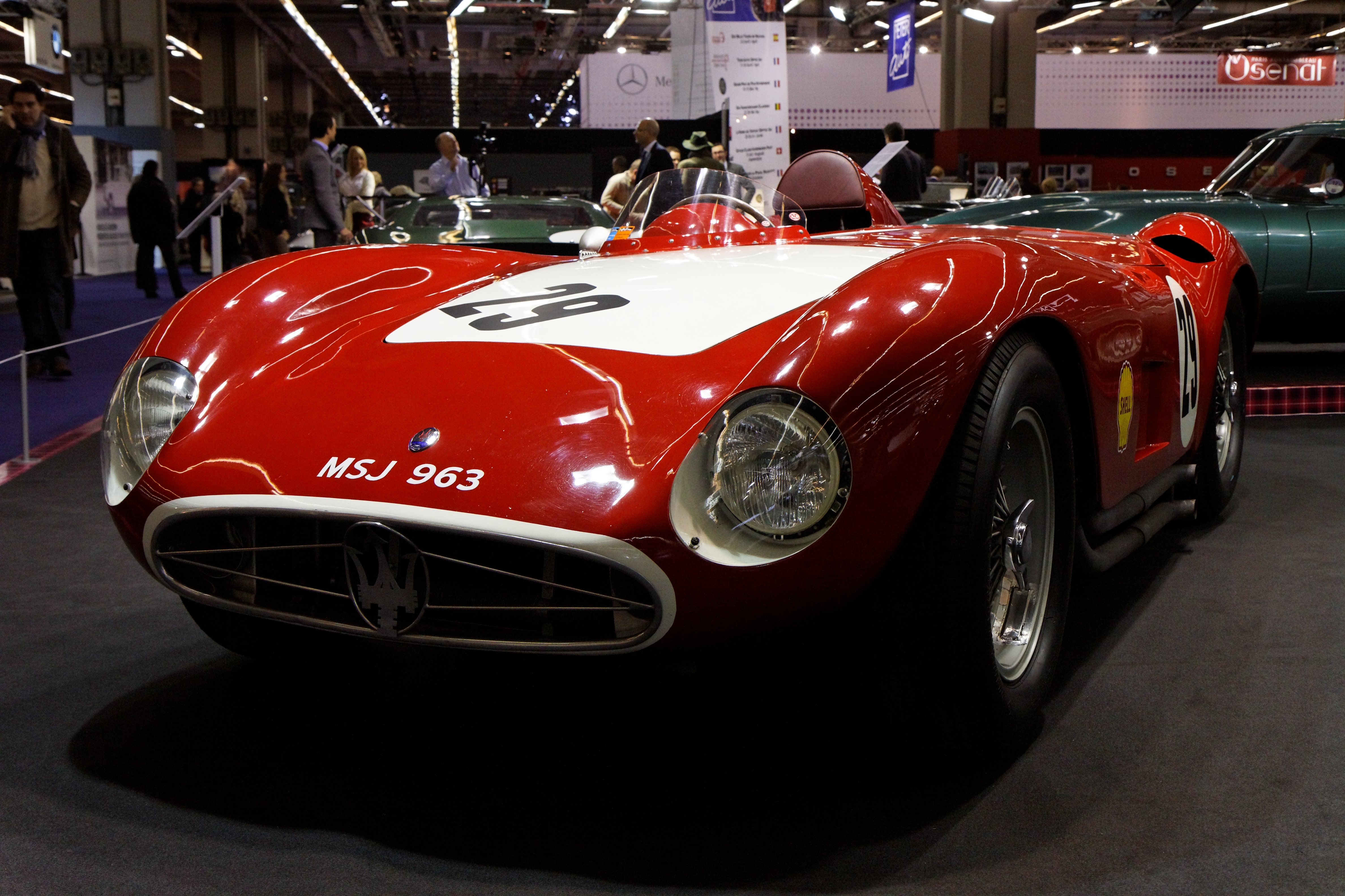 Photographie prise lors du salon rétromobile 2011 à Paris, porte de Versailles.